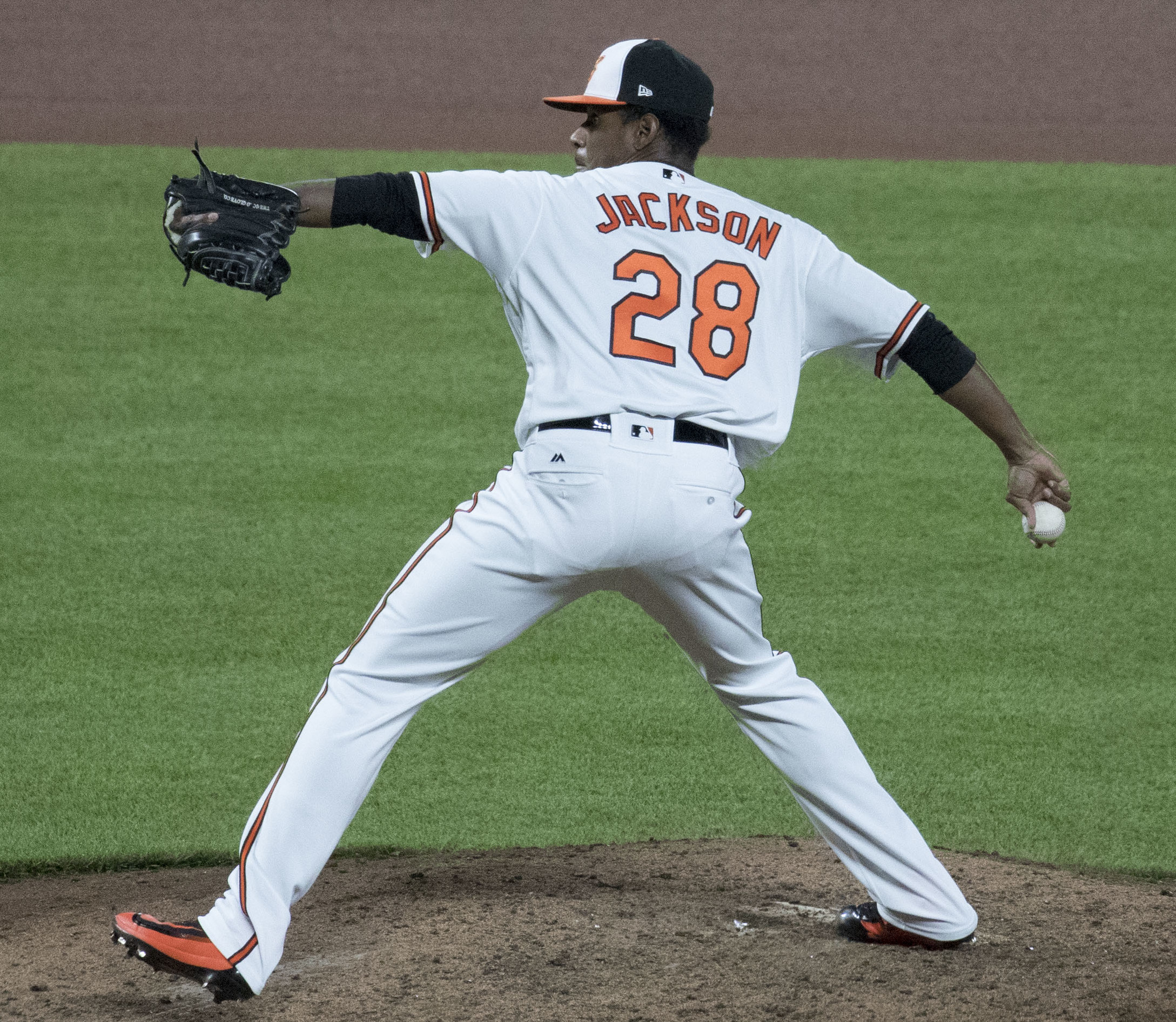 Pirates at Orioles 6/7/17